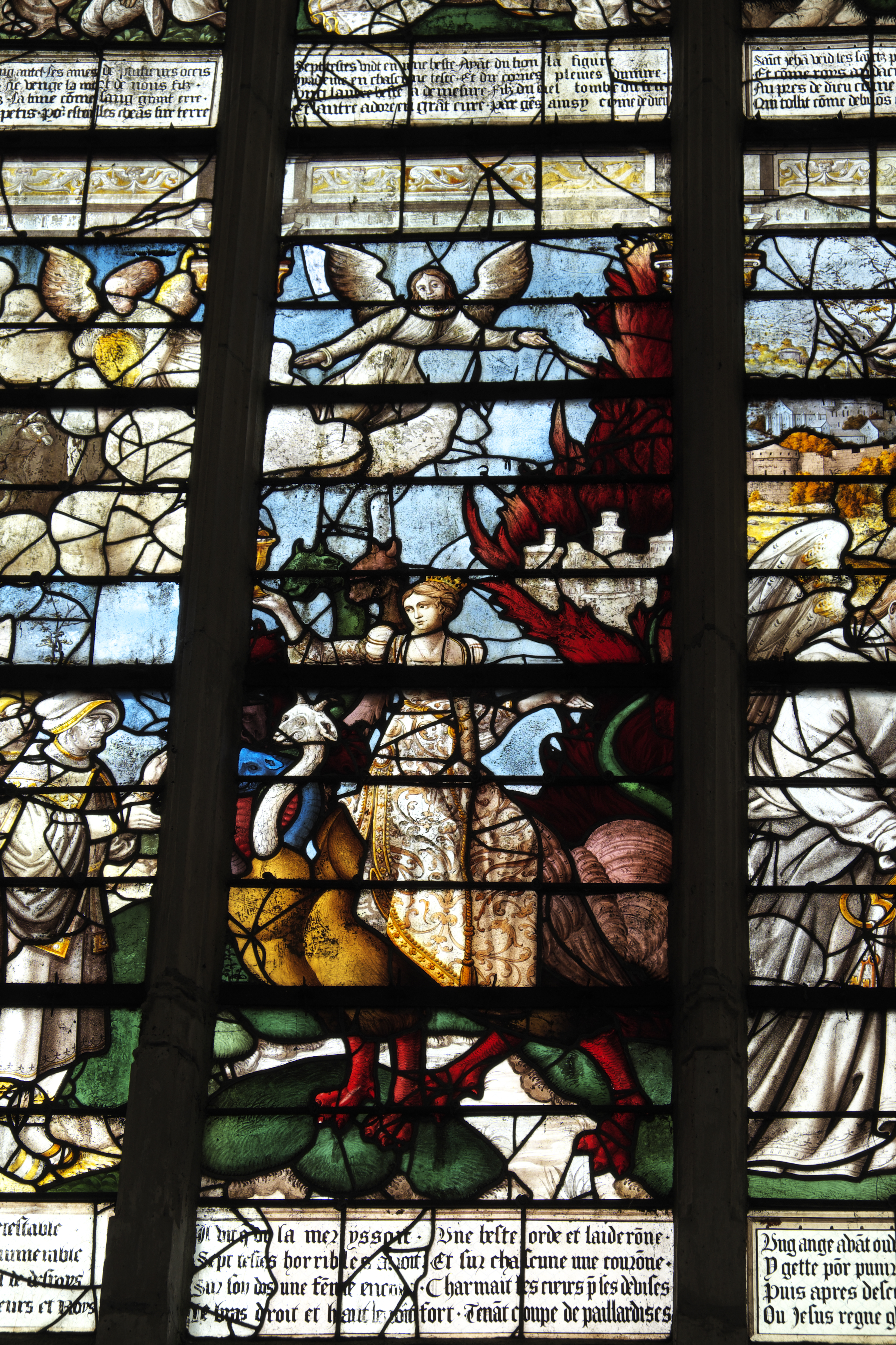 Katholische Kirche Saint-Georges in Chavanges im Département Aube (Champagne-Ardenne/Frankreich), Bleiglasfenster aus dem 16. Jahrhundert, Darstellung: Apokalypse, Hure Babylon (Ausschnitt).